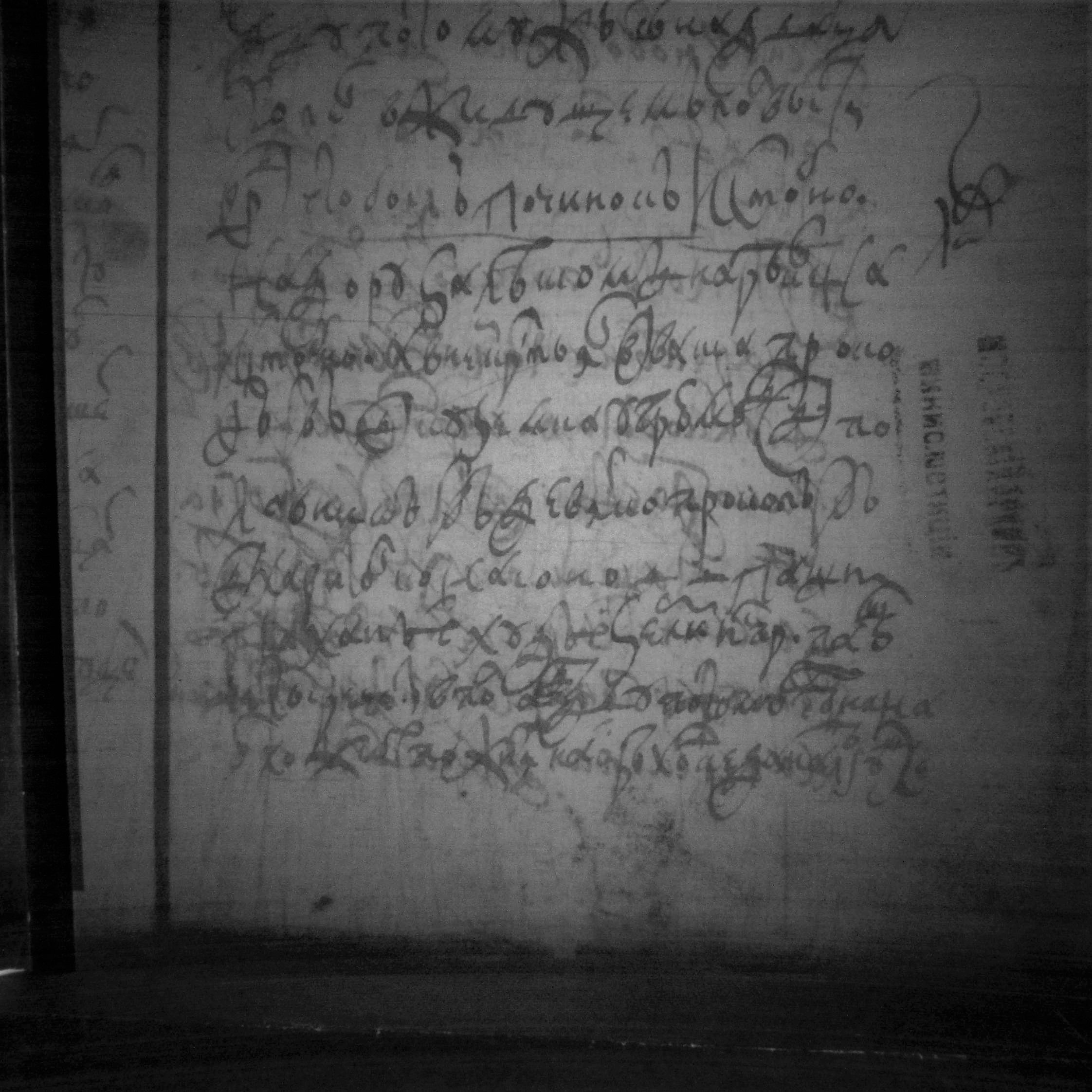 РГАДА: Ф1209 Оп1 Д15039 Л349